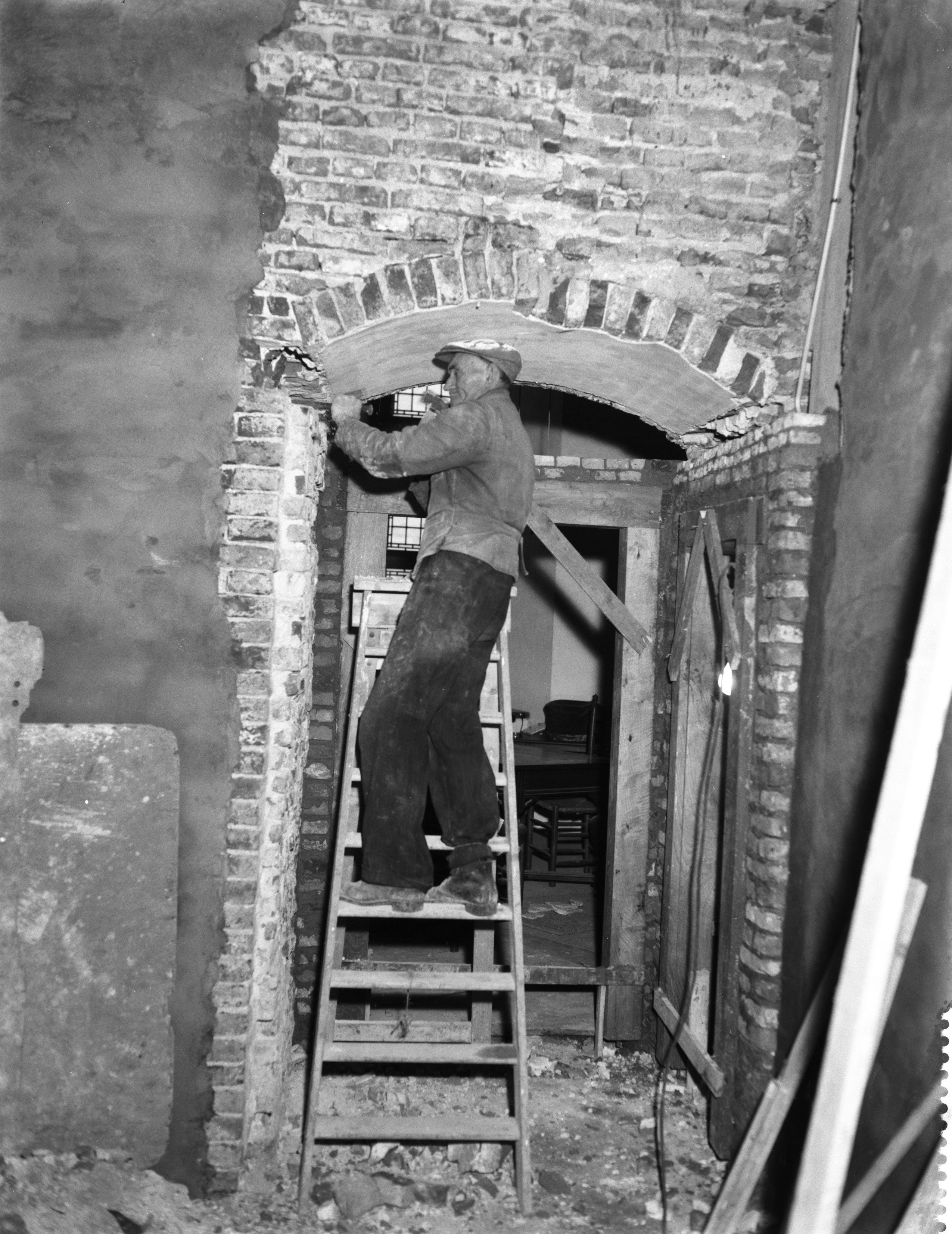 Collectie / Archief : Fotocollectie Anefo Reportage / Serie : [ onbekend ] Beschrijving : Muiderslot gerestaureerd (schouw keuken) Datum : 13 februari 1959 Instellingsnaam : Muiderslot Fotograaf : Rossem, Wim van / Anefo Auteursrechthebbende : Nationaal Archief Materiaalsoort : Negatief (zwart/wit) Nummer archiefinventaris : bekijk toegang 2.24.01.04 Bestanddeelnummer : 910-1545